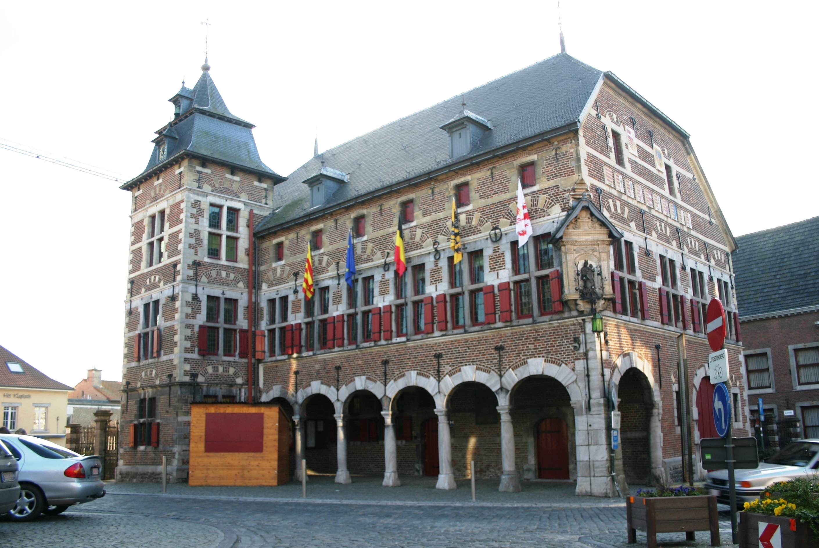 Stadhaus vu Borgloon .